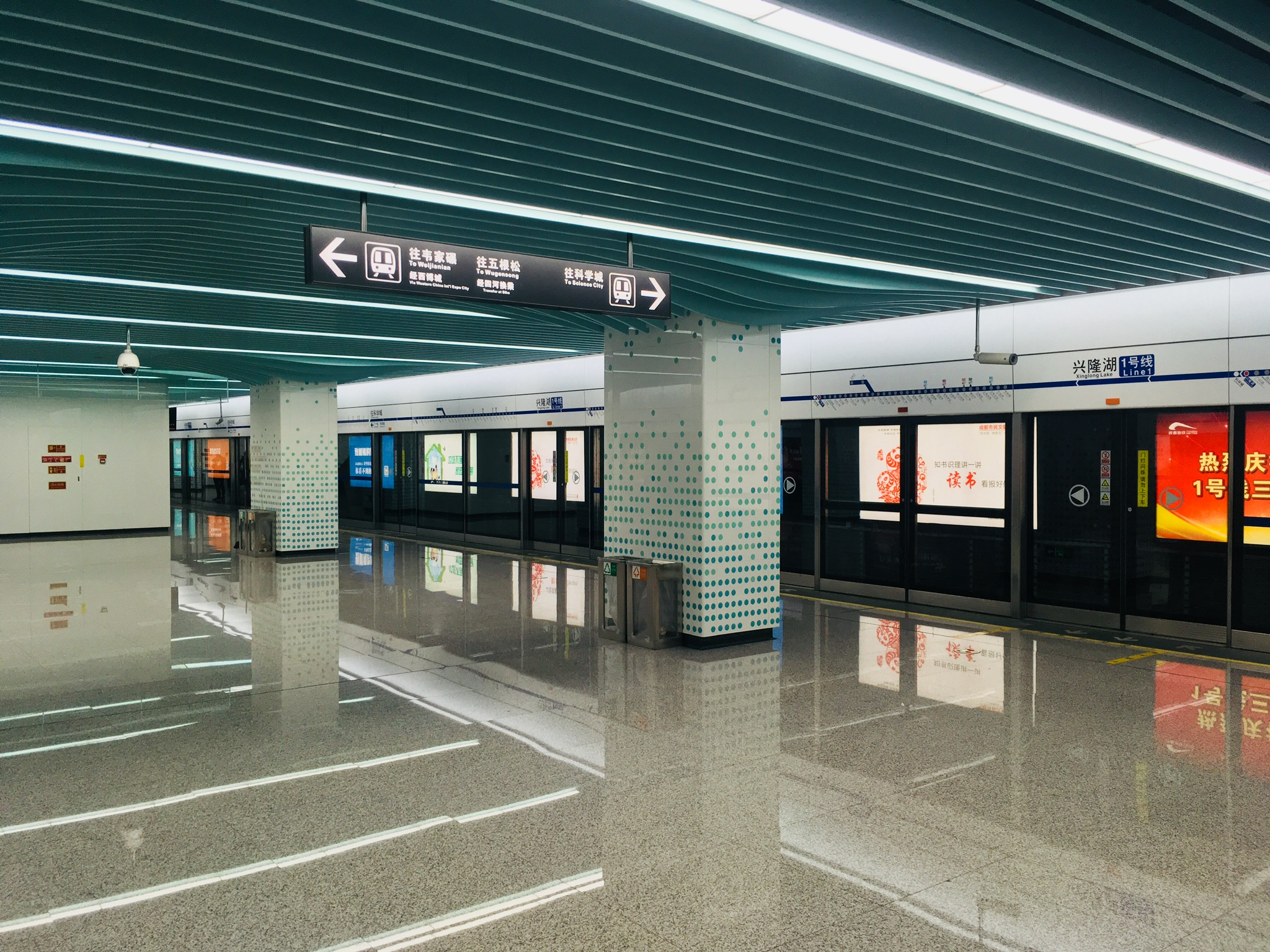 iPhone SE拍摄